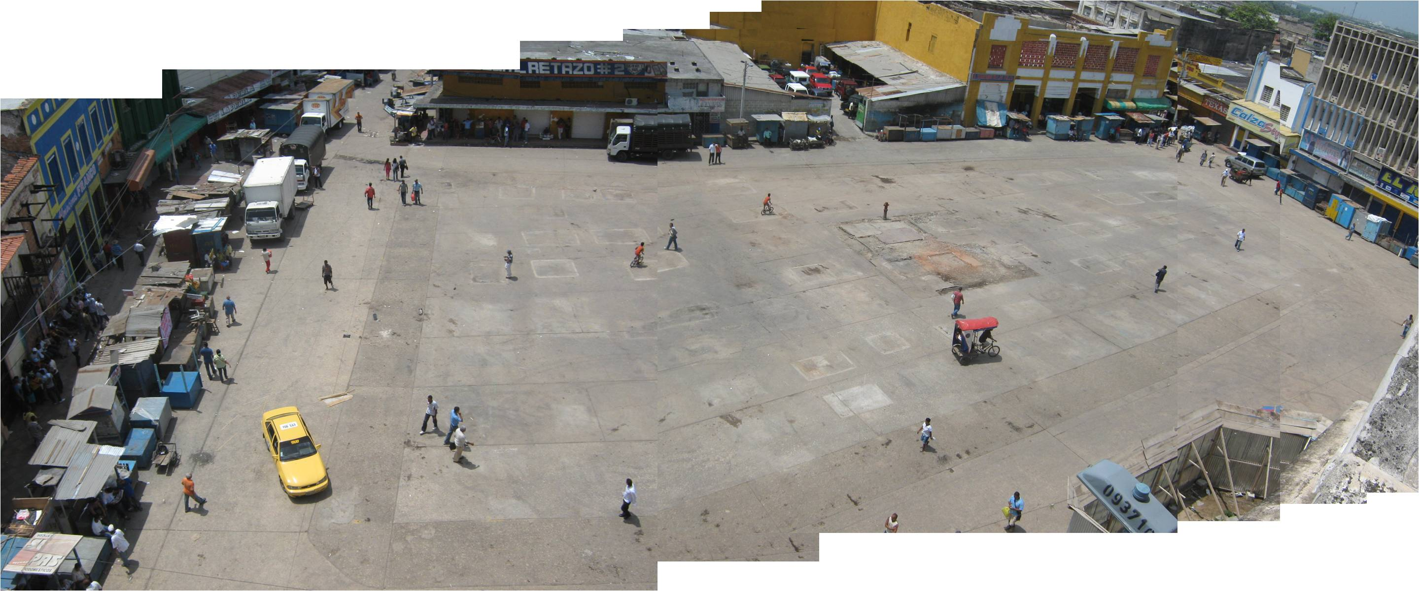 Fotografía de la plaza de San Nicolas (Barranquilla) después del desalojo de los vendedores estacionarios.